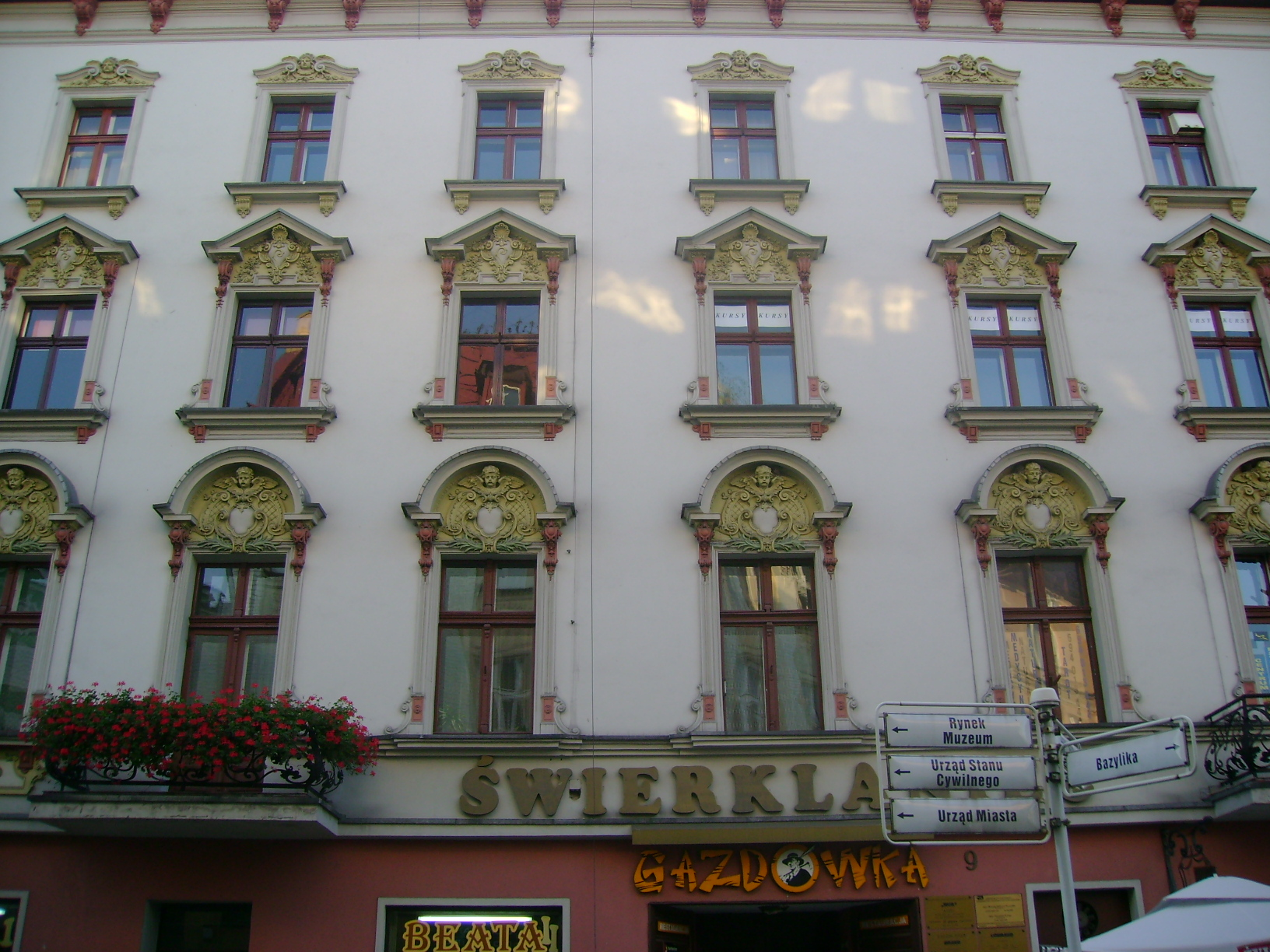 Swierklaniec, Rybnik